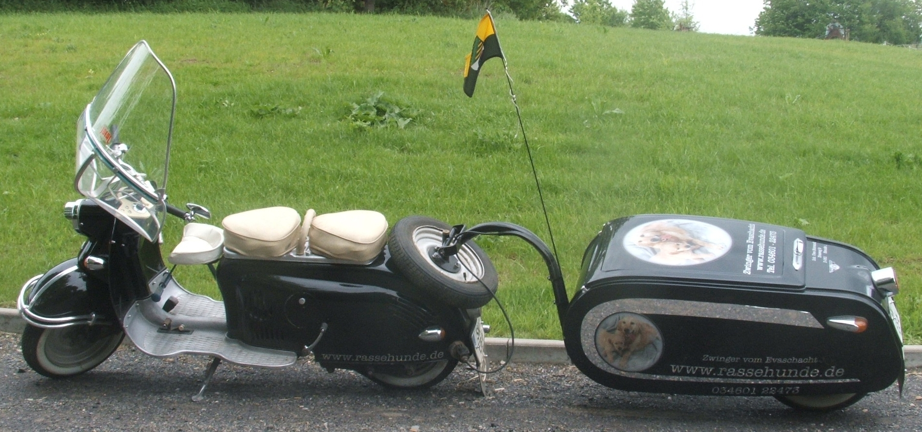 Stadtroller Berlin Bj. 1961 mit Einradanhänger Campi Baujahr 1962 aus den IWL (Industriewerke Ludwigsfelde)